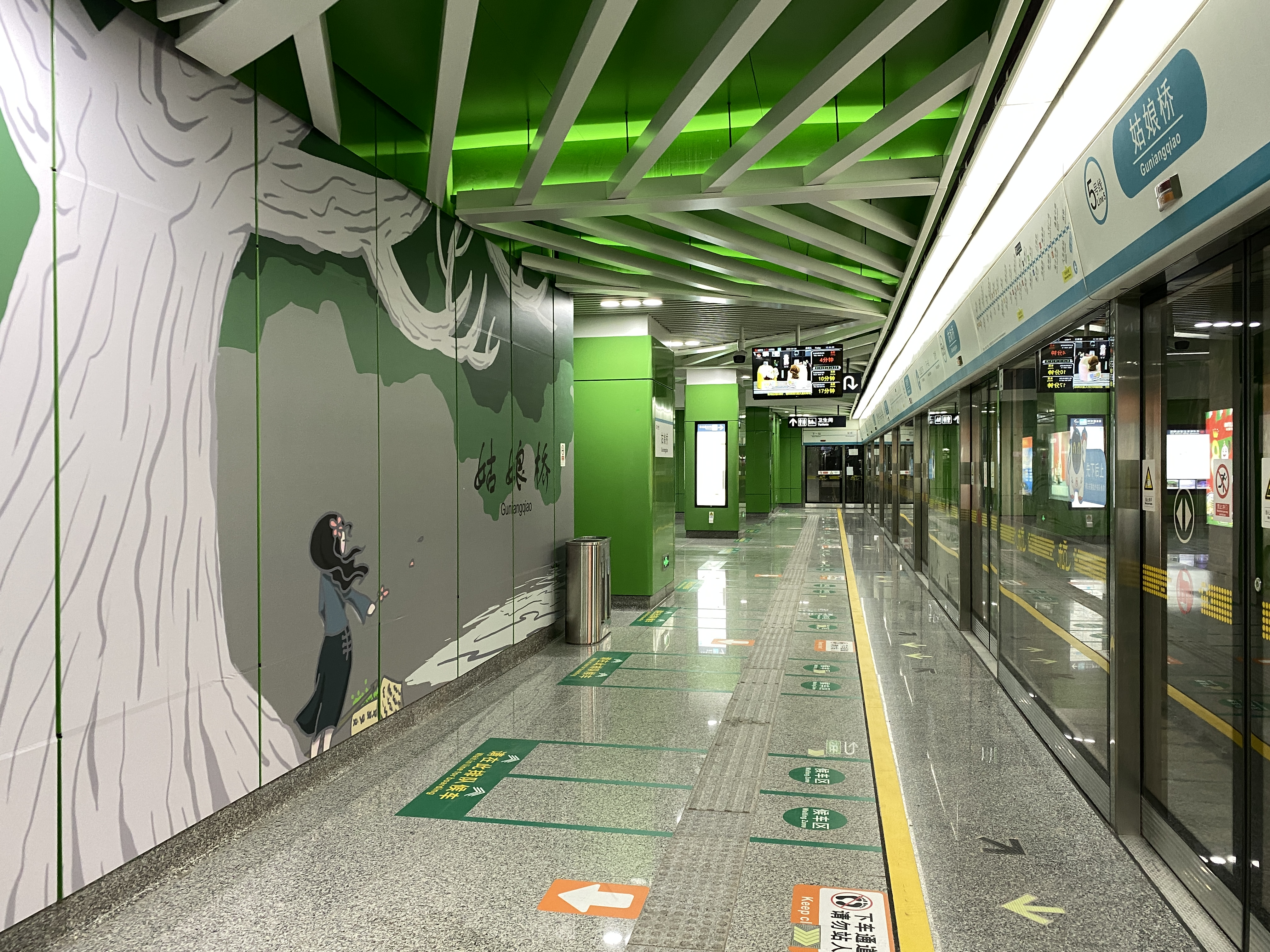 姑娘桥站站台